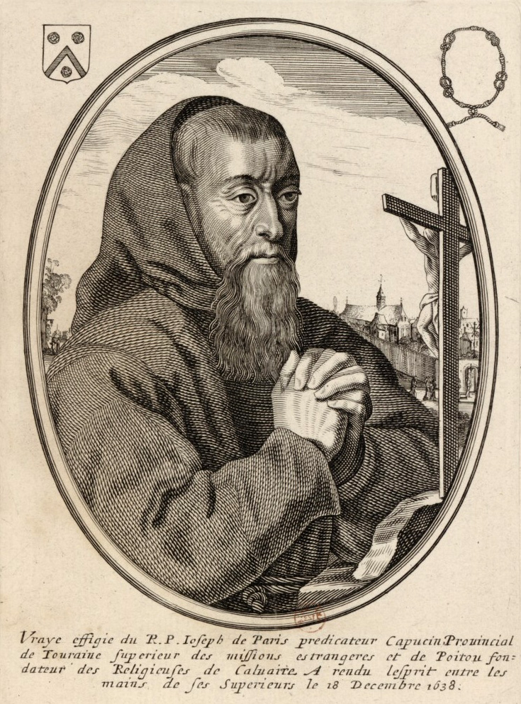 Portrait du père Joseph, en buste, de 3/4 dirigé à droite, priant devant un crucifix, dans une bordure ovale.